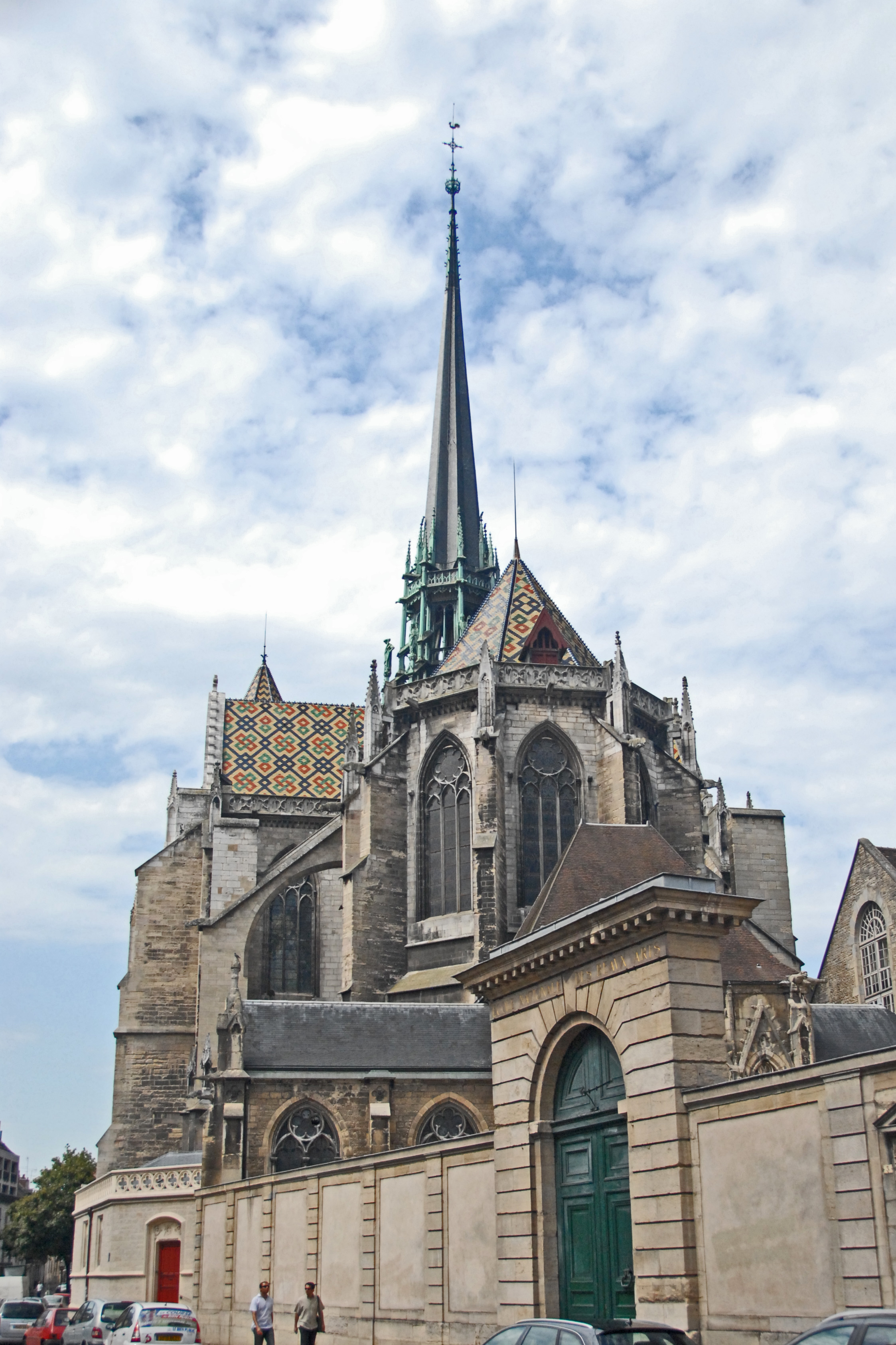 St-Bénigne von SO